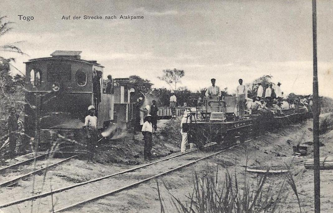 Togo - Auf der Strecke nach Atakpamé - Verlag der Kathol. Mission, Lome